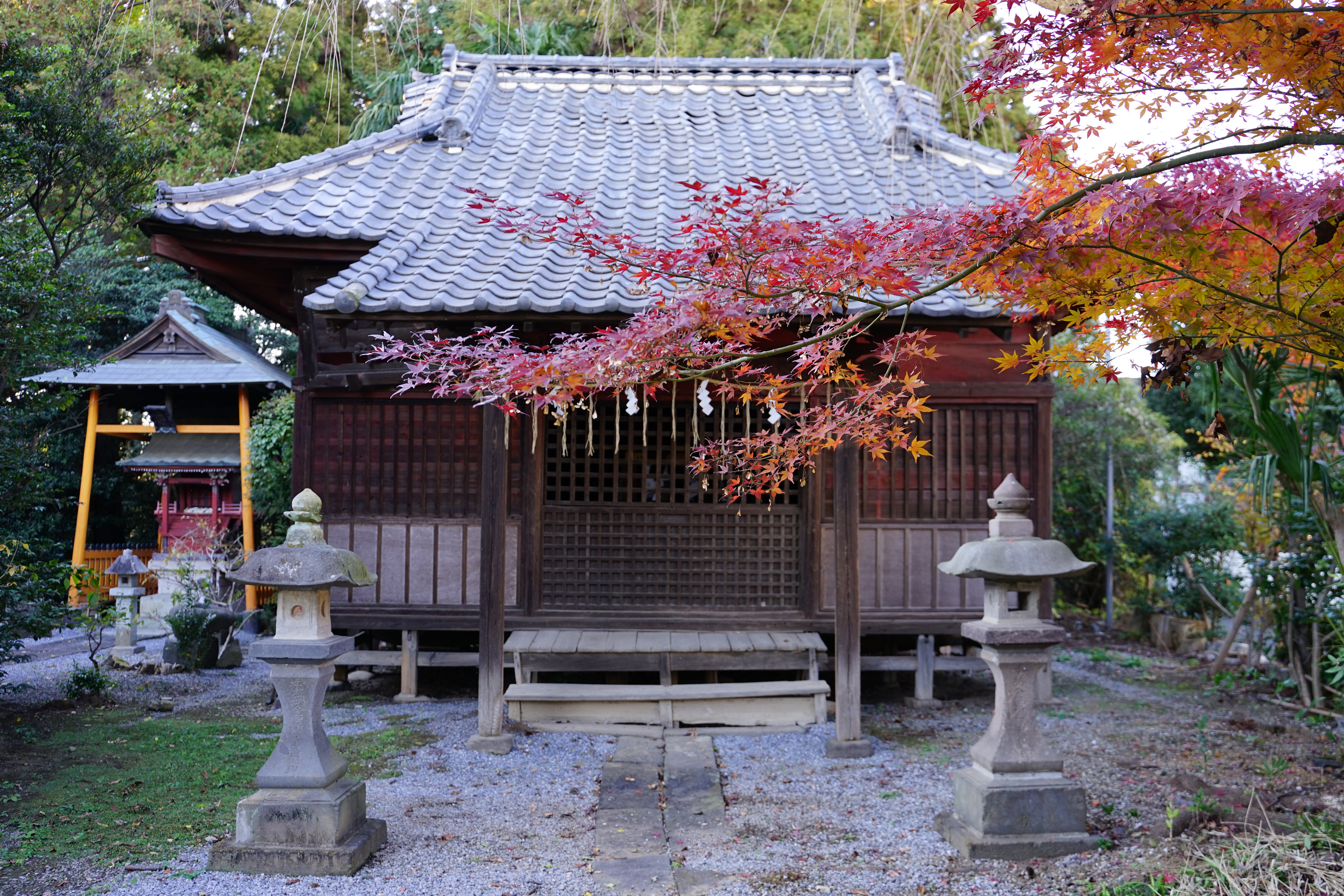 長良神社（群馬県館林市代官町）の神輿殿